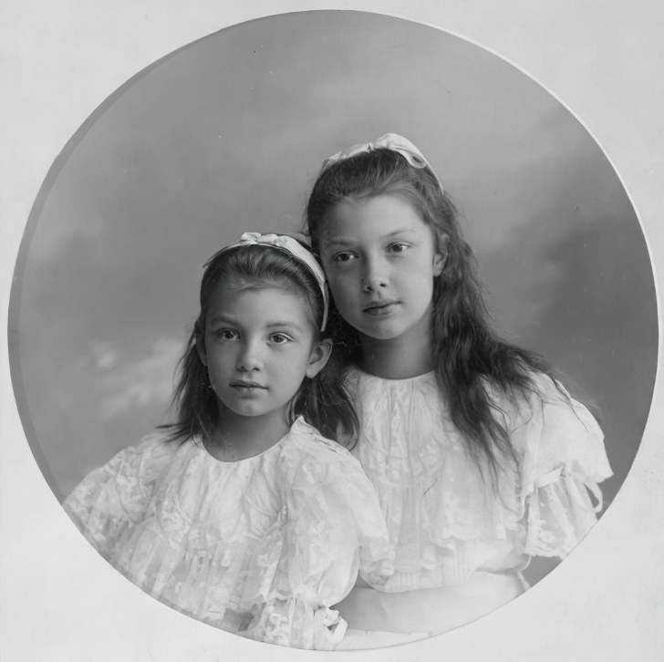 Elisabeth Franziska mit Hedwig von Österreich-Toskana.